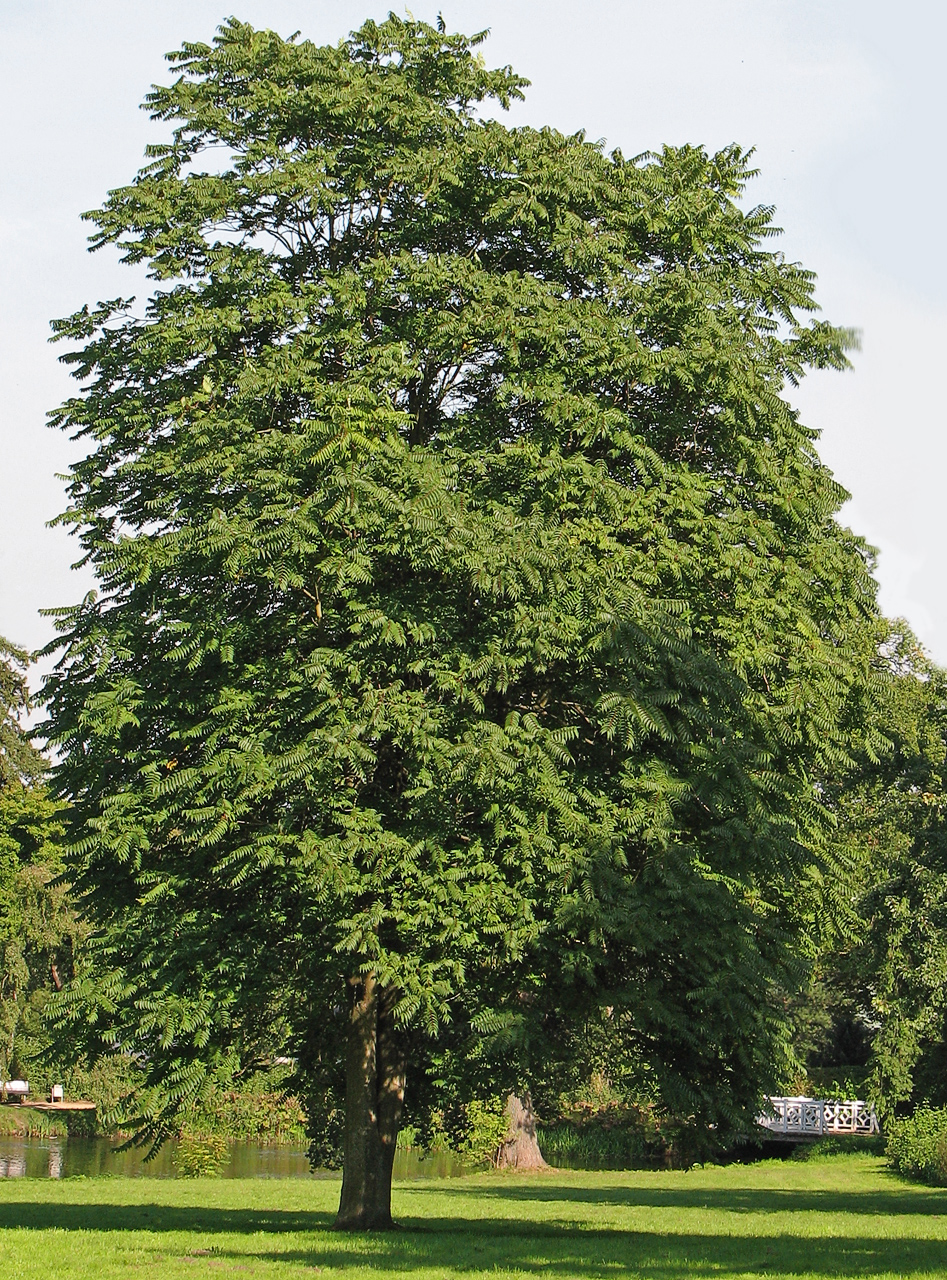 Beschreibung: Götterbaum (Ailanthus altissima) Fotograf: Darkone, 5. September 2005